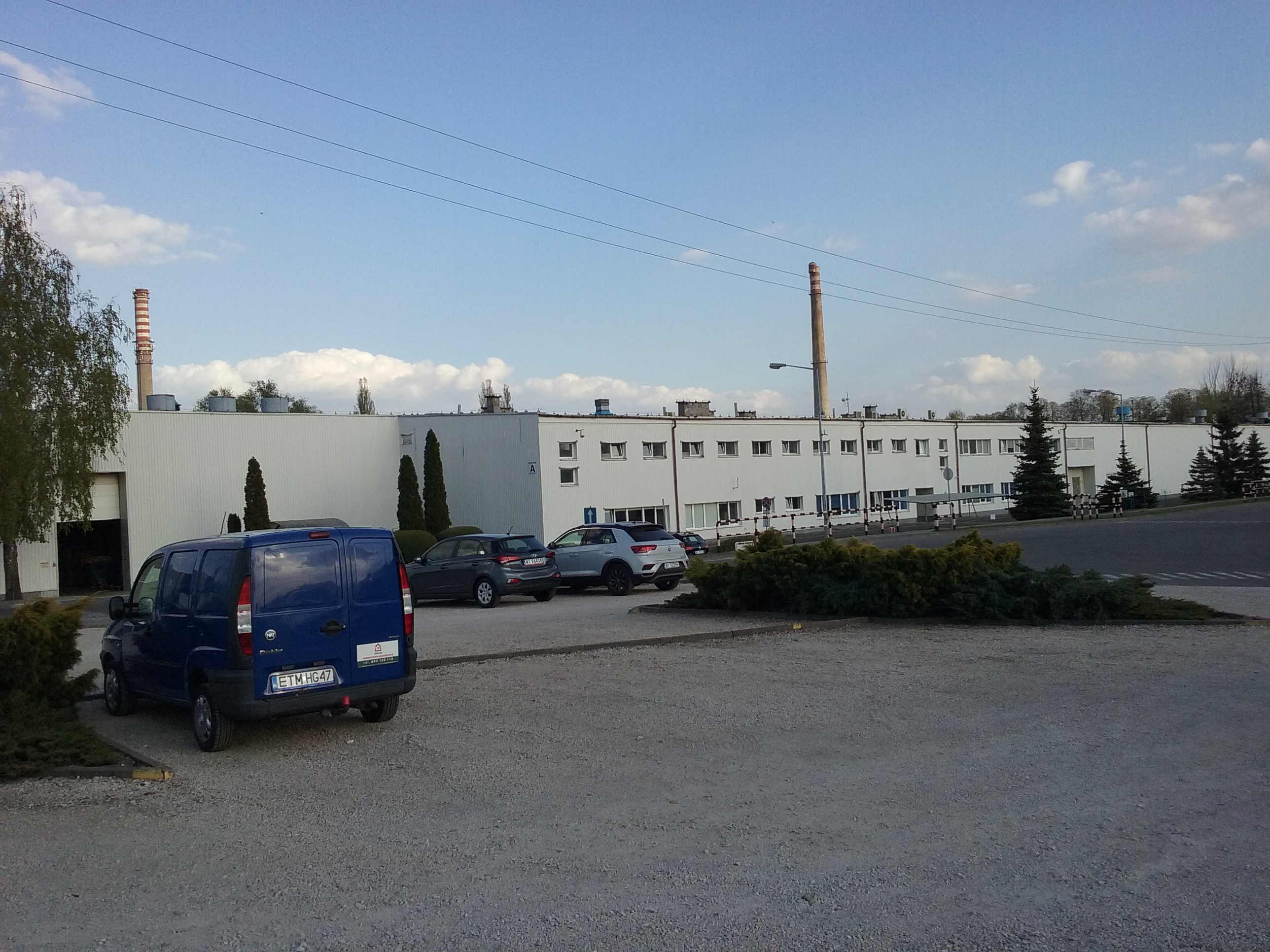 Tomaszów Mazowiecki w województwie łódzkim, PL, EU. Zakłady Toyota Boshoku, produkujące tapicerkę do aut premium japońskiego koncernu. Ulica Piaskowa. CC0